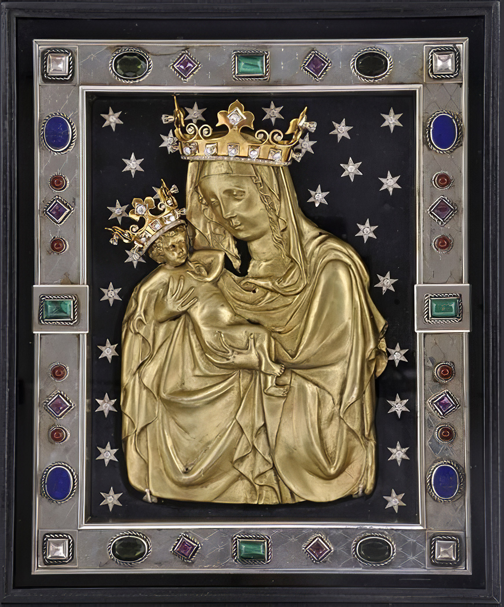 Křesťanská tradice spojila původ Palladia s počátky křesťanství v Čechách. Měla ho obdržet sv. Ludmila při svém křtu od sv. Metoděje na Velké Moravě a později jej darovat svému vnukovi sv. Václavu. Ten jej nosil pravidelně u sebe a nejinak tomu bylo i v den jeho vraždy ve Staré Boleslavi. V období protireformace se za podpory panovníka, předních katolických šlechticů, prelátů z okolí pražské katedrály a otců z Tovaryšstva Ježíšova se milostný obraz konstituuje jako duchovní záštita celého království, k níž se obrací věřící v dobách ohrožení i s osobními potřebami.